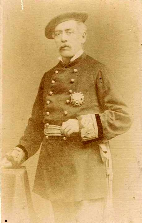 General carlista